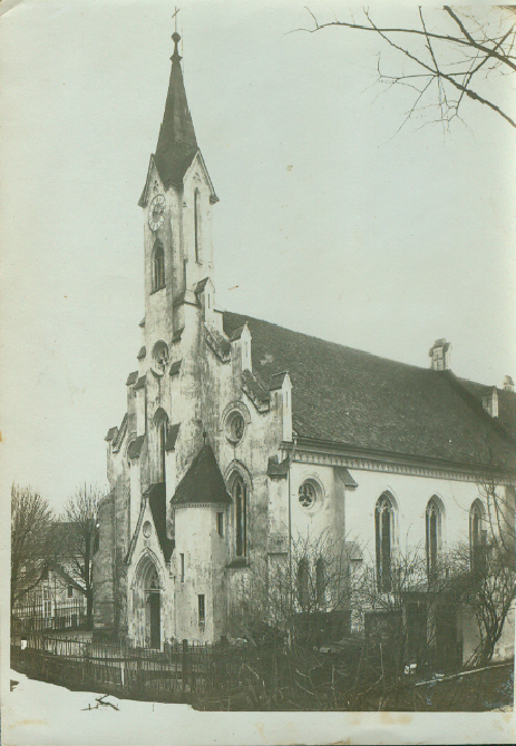 Die Kirche zu den Feierlichkeiten der Glockenweihe sowie der Weihung der Kriegergedenktafeln.